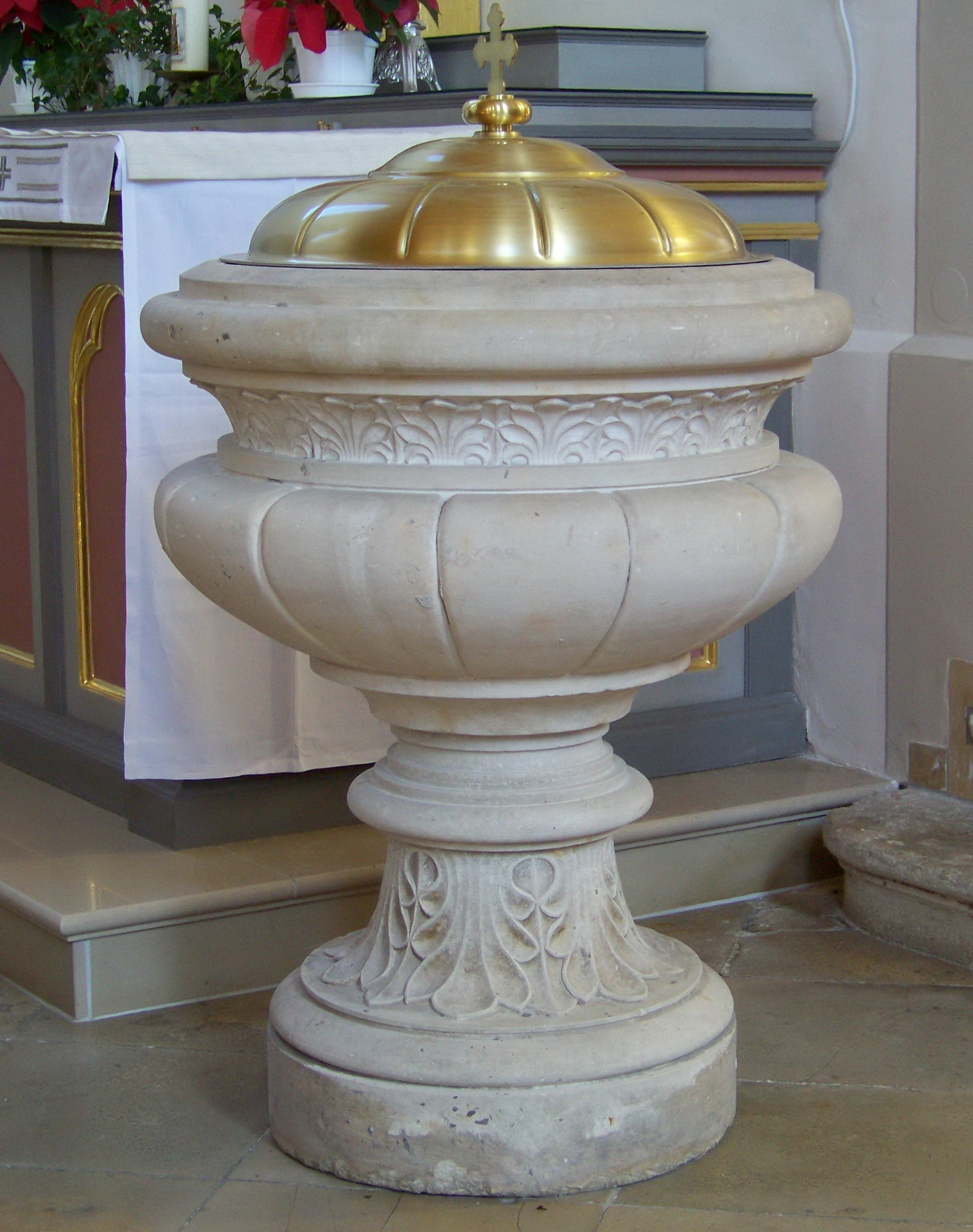 Laberweinting, Hofkirchen 77, katholische Pfarrkirche St. Peter erbaut 1863/64. Rechts vom nördlichen Seitenaltar steht das Taufbecken aus Sandstein in Kelchform aus der Erbauungszeit der Kirche. Fuß und Becken sind umlaufend mit Blattornamenten verziert. Die vergoldete Abdeckung stammt aus neuerer Zeit.